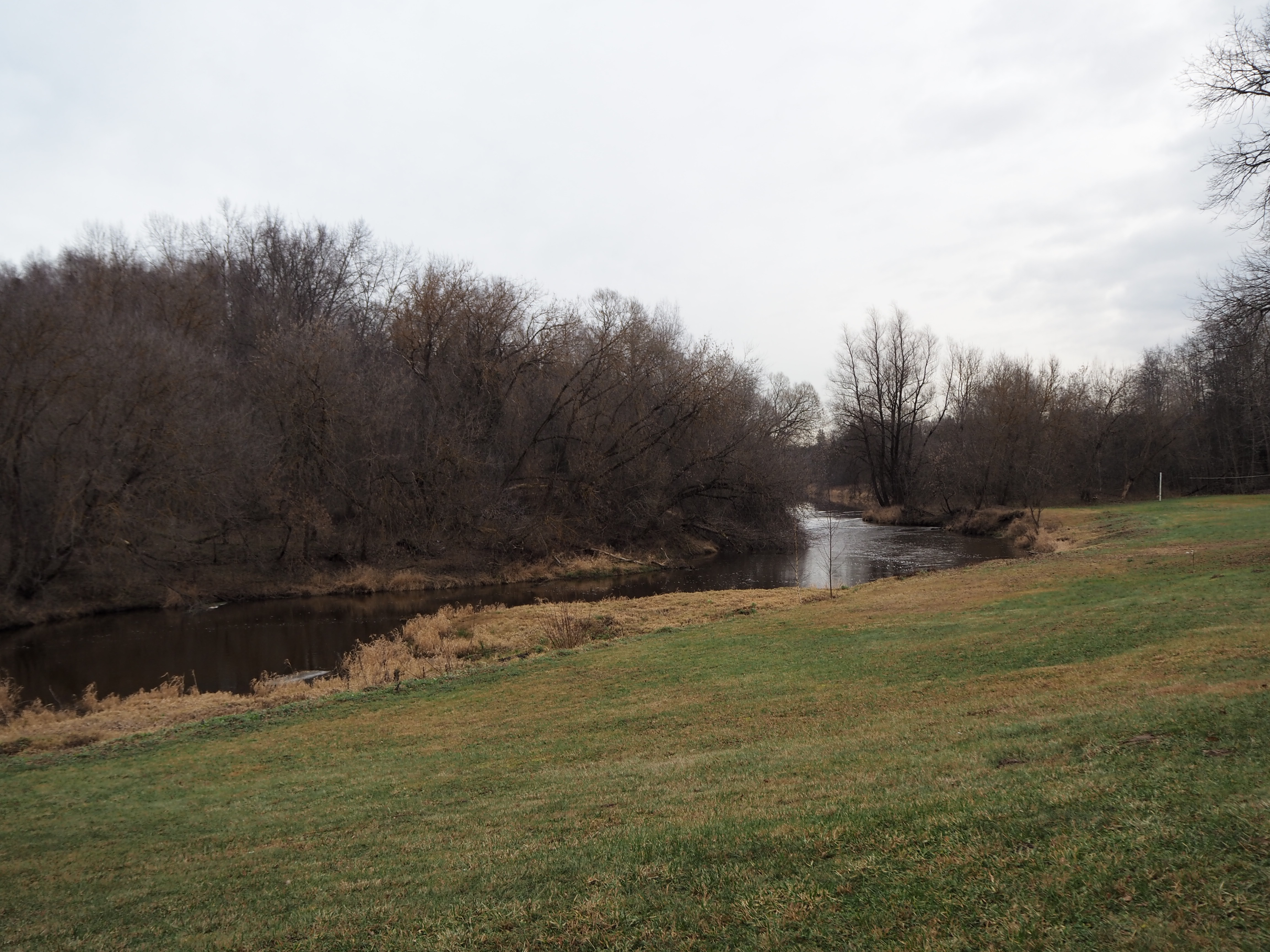 Река Дубна около пансионата "Вербилки" в селе Новоникольское Талдомского района Московской области.